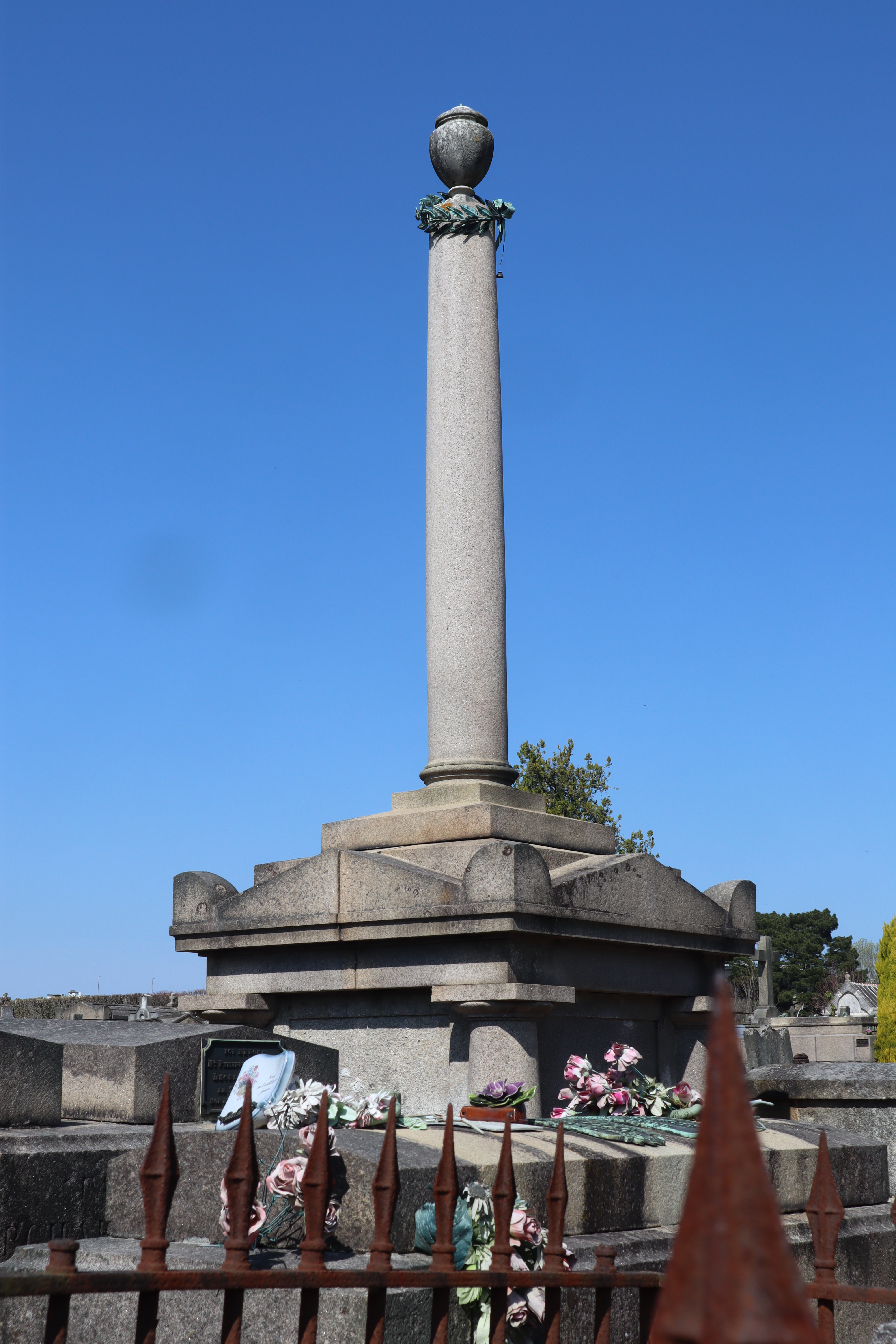 Tombe de Pierre Haudaudine au Cimetière Miséricorde à Nantes (44).